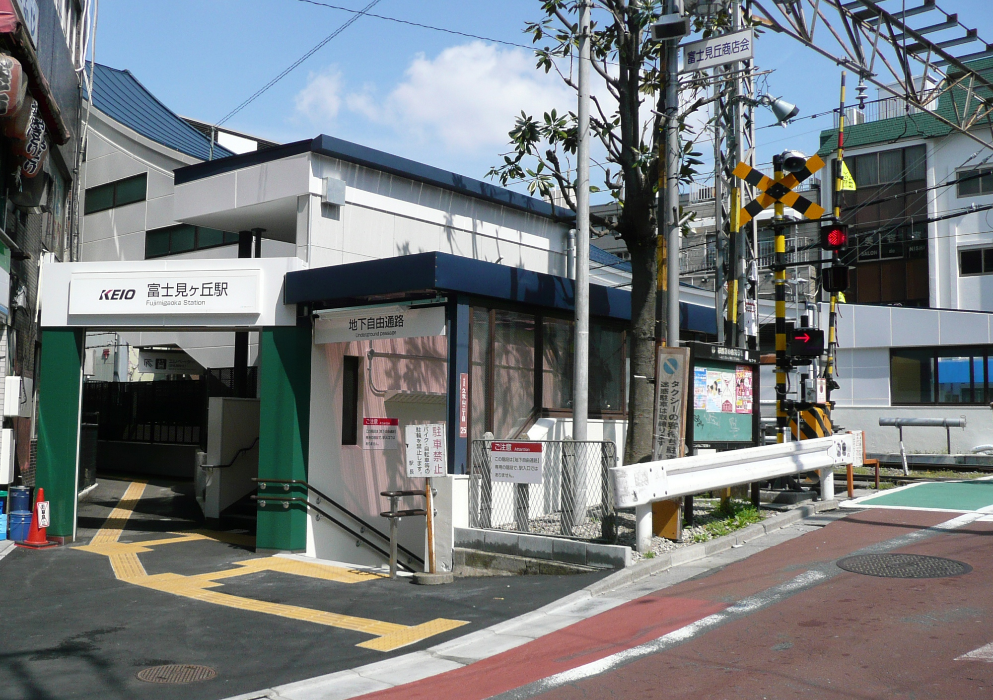 富士見ヶ丘駅南口